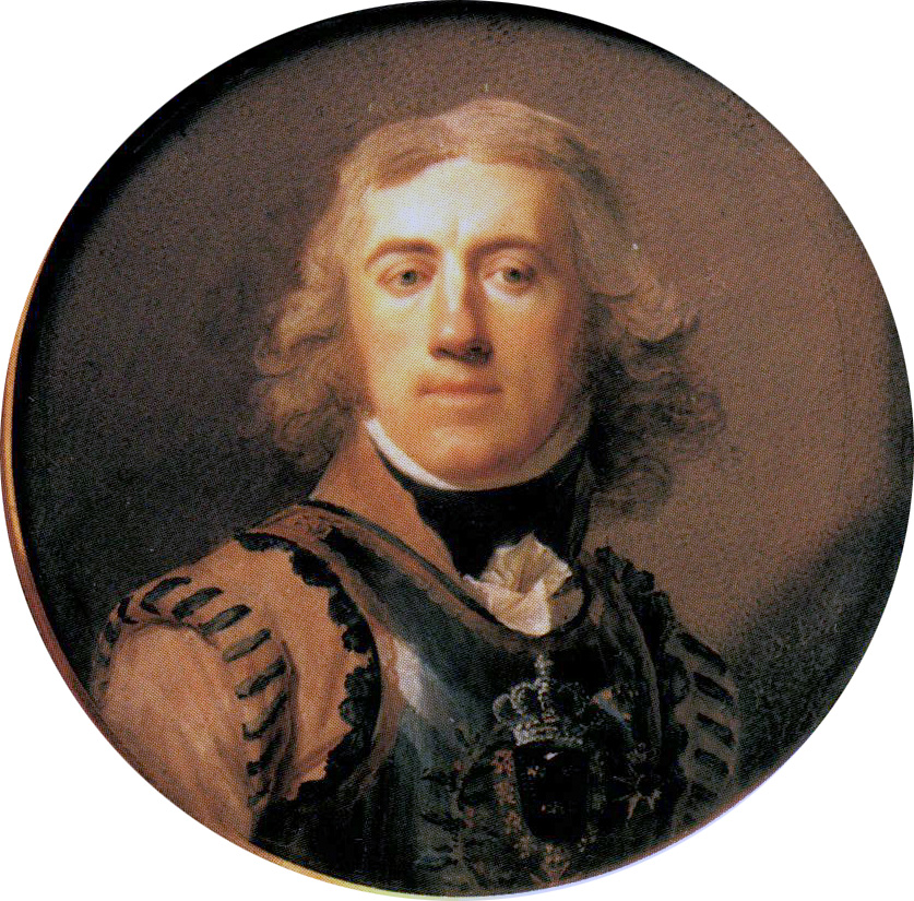 Hampus Mörner (1763-1824)